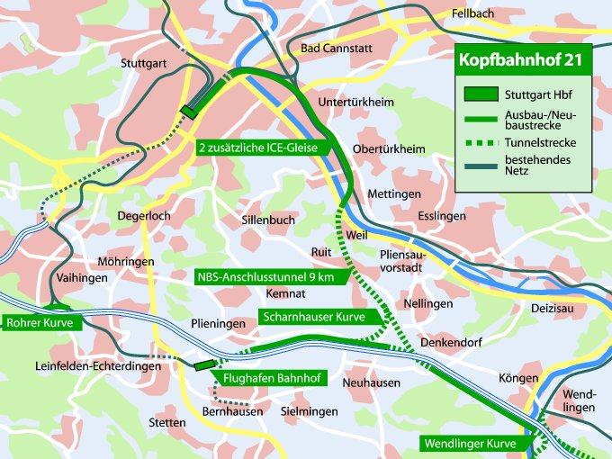 Schematische Darstellung für das Projekt Kopfbahnhof 21